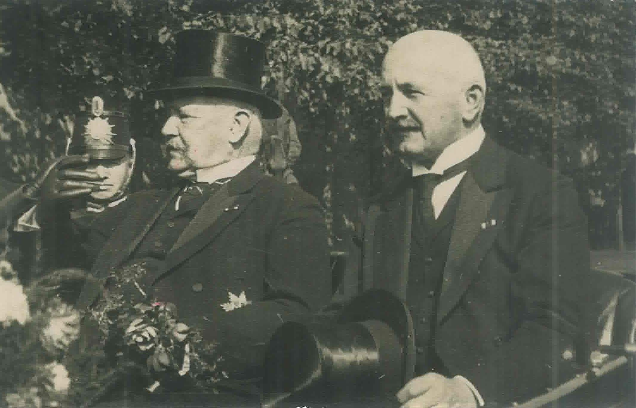 Paul von Hindenburg and Georg von Thaer during Hindenburgs' vistation of Silesia